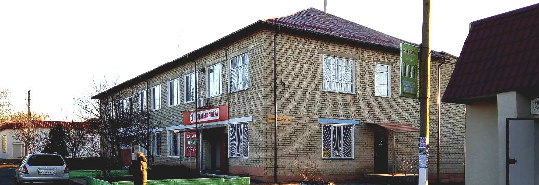 Рада Затишшя